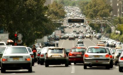 Satiksme Teherānas ielās.